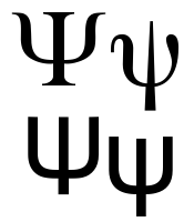 greek letter psi